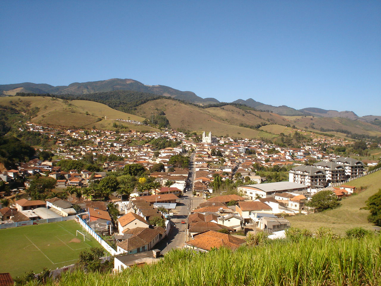 Vista do centro da cidade de Cristina